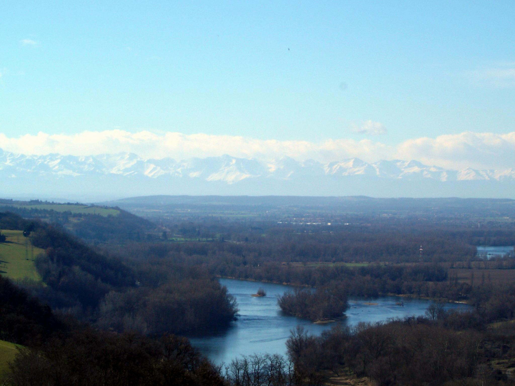 Vue sur la chaine des Pyrénées depuis les coteaux de Pech-David, au sud de la ville de Toulouse.